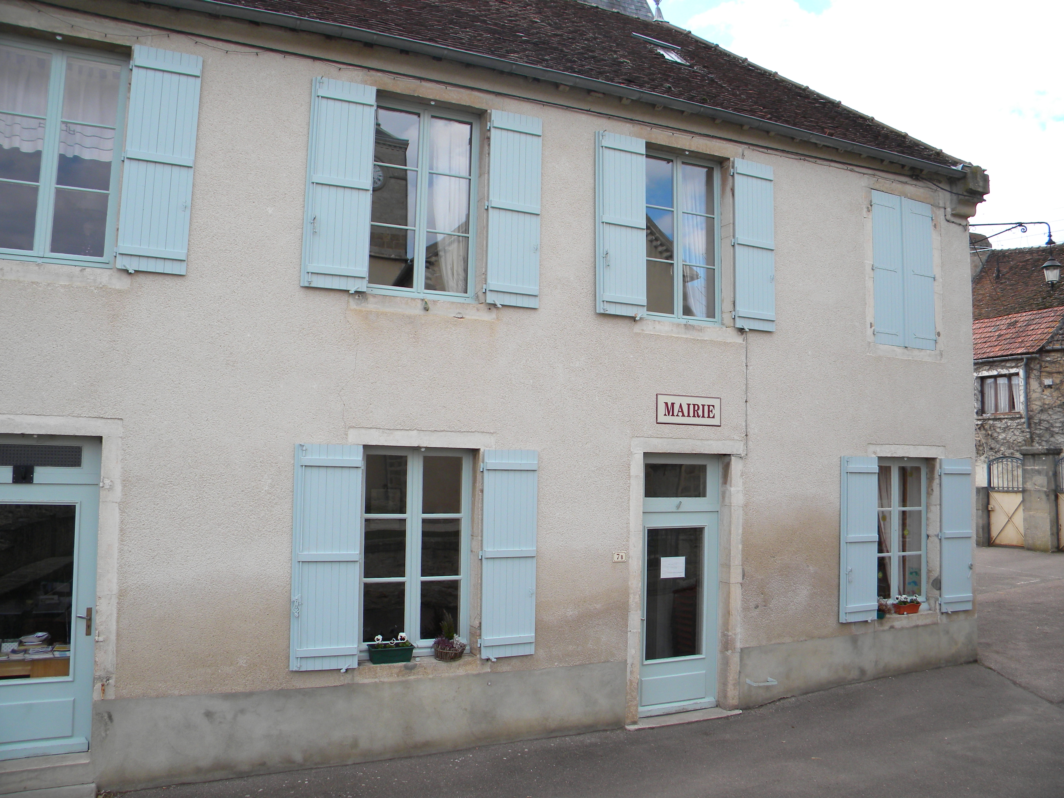 Urbodomo de Molinot